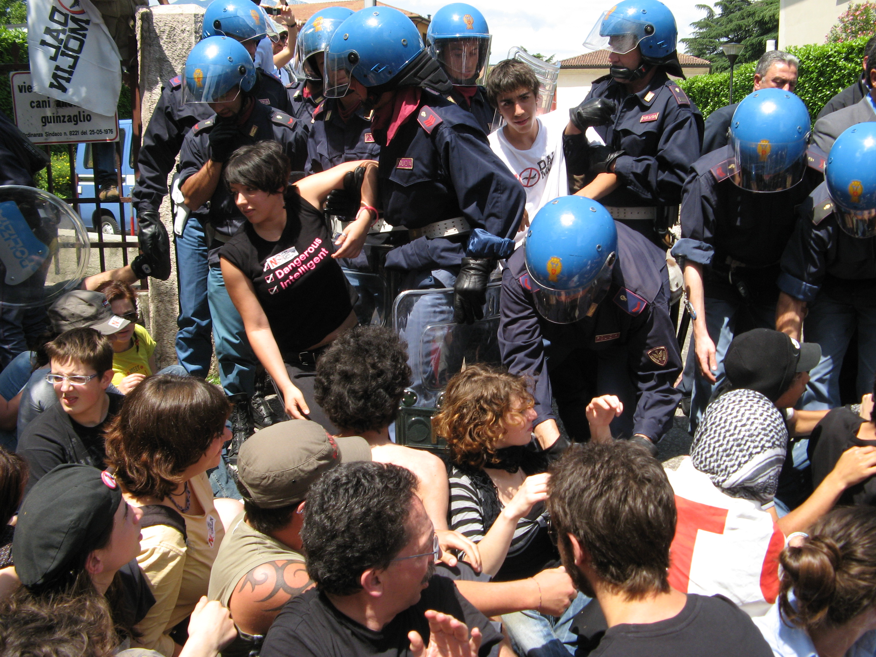 La polizia porta via di forza i manifestanti che bloccano l'uscita dell'auto di Romano Prodi dall'Auditorium S. Chiara di Trento durante il Festival dell'Economia 2007.